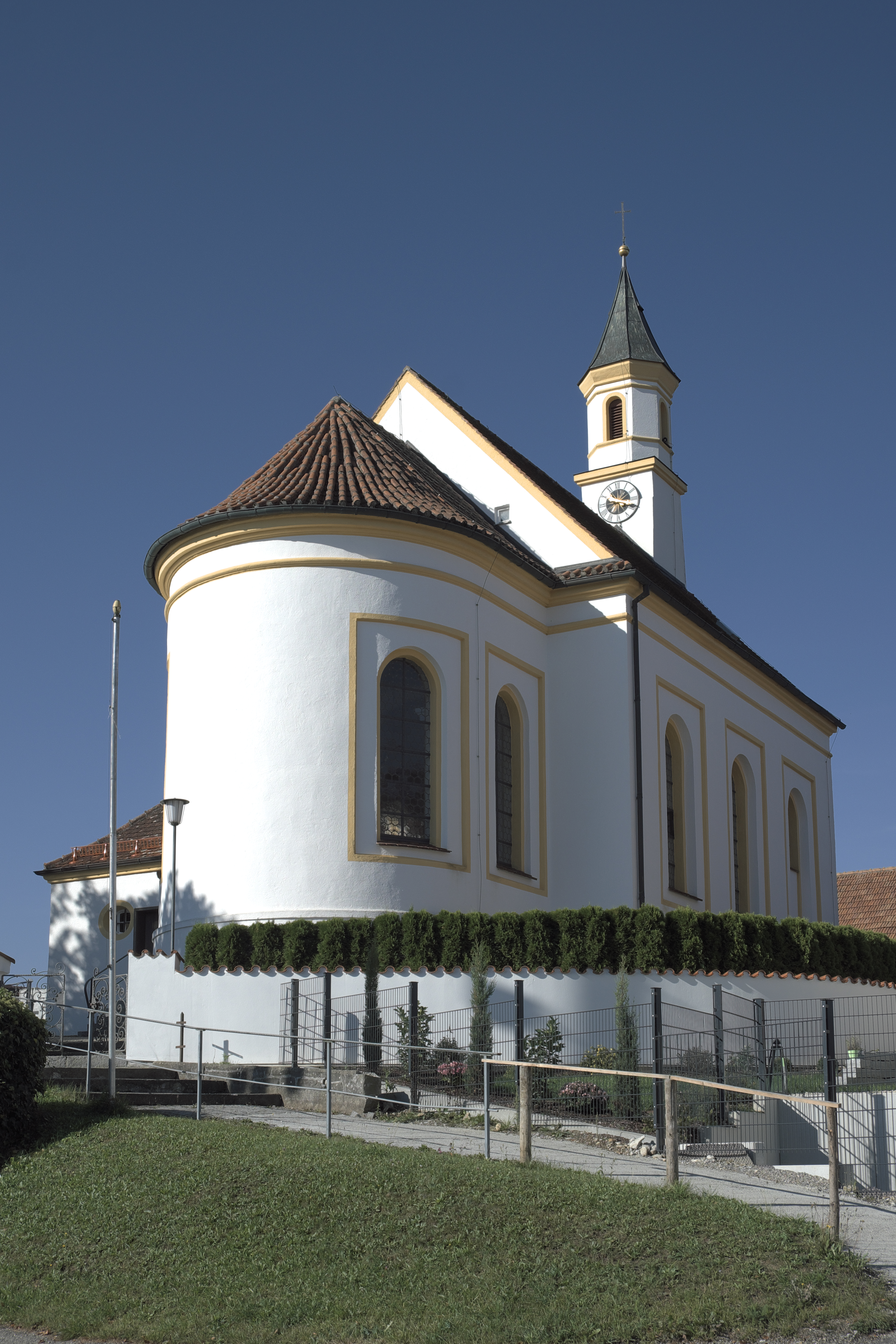 Katholische Filialkirche St. Pankratius in Ramsach (Penzing) im Landkreis Landsberg am Lech (Bayern/Deutschland)